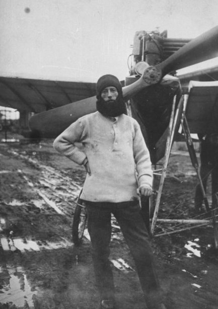 Prodam Guido (Fiume, 1882. szeptember 12. – Budapest, 1948. július 1.) olasz származású magyar, gyógyszerész, repülőgéptervező, a magyar aviatika úttörője.